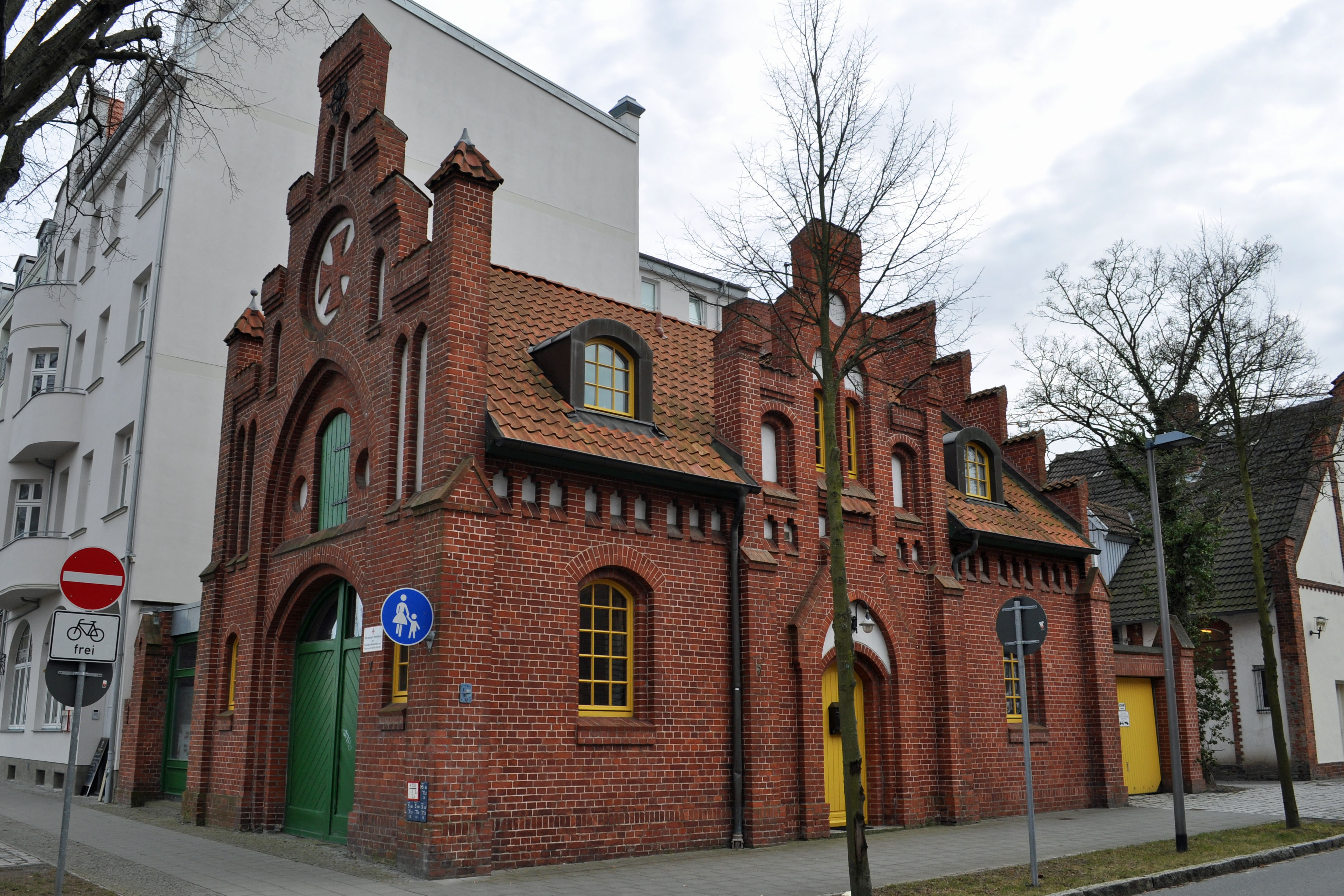 Gebäude bzw. Gebäudedetail in Stralsund. Straße und Hausnummer siehe Dateiname.